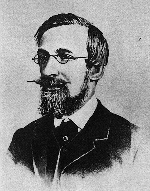 Фёдор Михайлович Дмитриев (1829 —1894 ) — юрист, профессор Московского университета